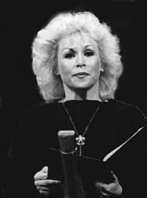 ADN-ZB Link 23.10.87 Berlin: Jubiläum-Staatsakt. Zum Abschluß des festlichen Staatsaktes ertönte Ludwig van Beethovens 9. Sinfonie. Unter den Solisten des Finalsatzes mit der Kantate über Schillers "Ode an die Freude" war u.a. Eva-Maria Bundschuh.